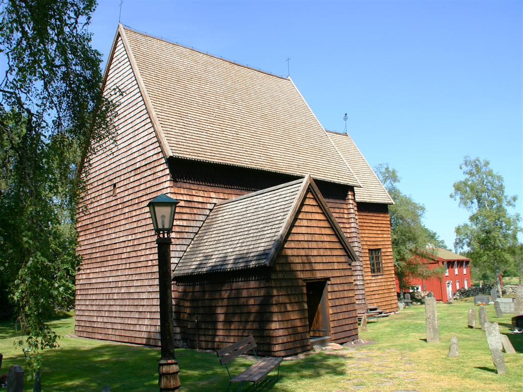 Foto: Tor Svensson